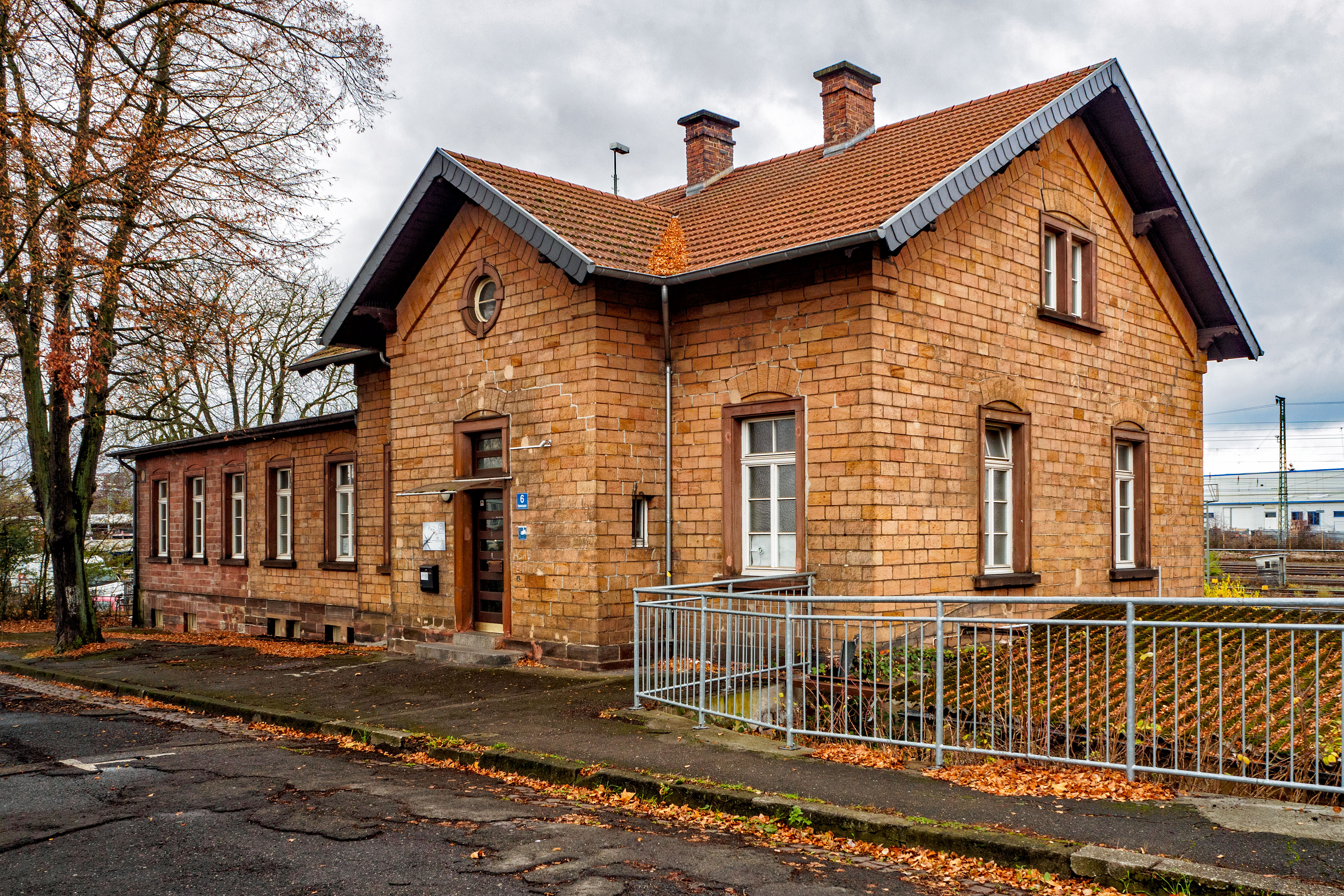 Homburg Bahnhofsplatz 6, Bahnmeisterei der „Pfälzischen Ludwigsbahn“ mit Wohnhaus